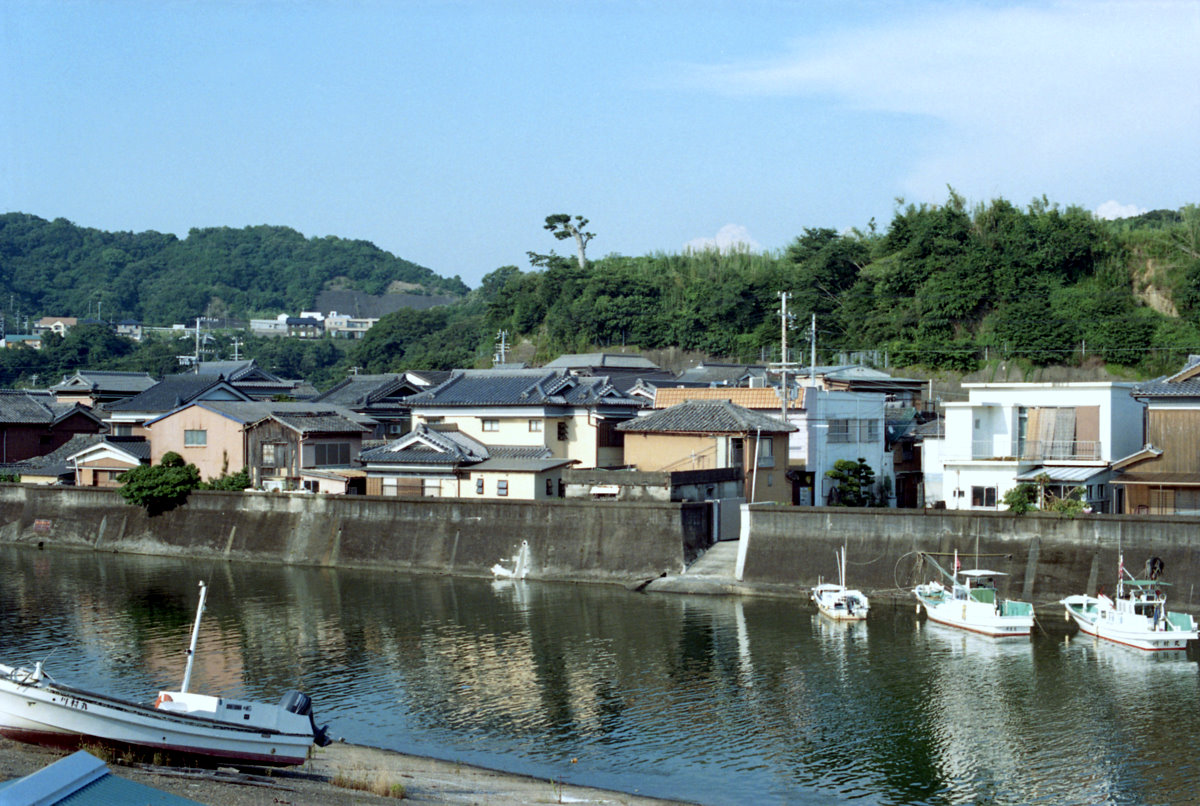 印南